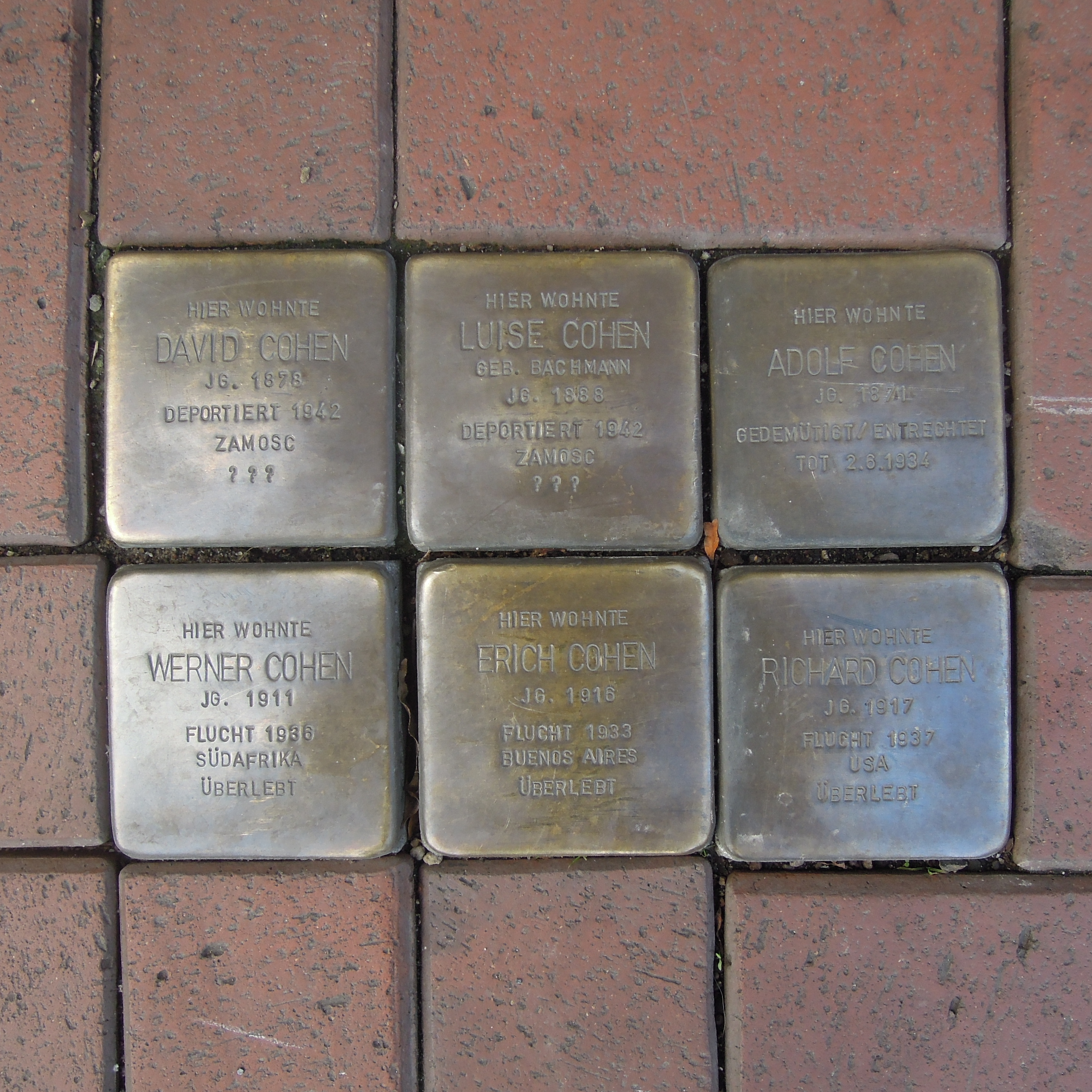 Stolpersteine Am Markt 24